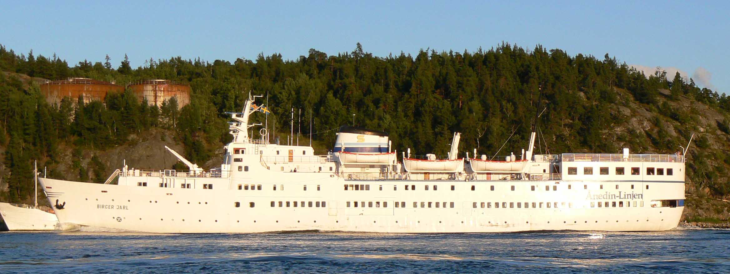 Bild tagen på M/S Birger Jarl 2007-07-19 kl. 20.38, precis norr om Telegrafberget, inloppet till Sthlm då hon lämnat Sthlms hamn påväg mot Åland. IMO Number: 5044893 MMSI Number: 265878000 Callsign: SIAU Length: 92 m Beam: 14 m This is an image of the protected Swedish ship M/S Birger Jarl, with call sign SIAU .